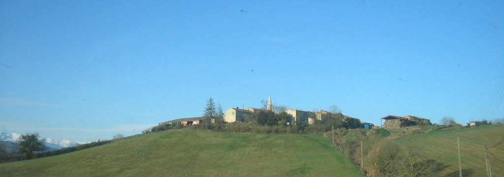 Vue panoramique de Lignairolles.